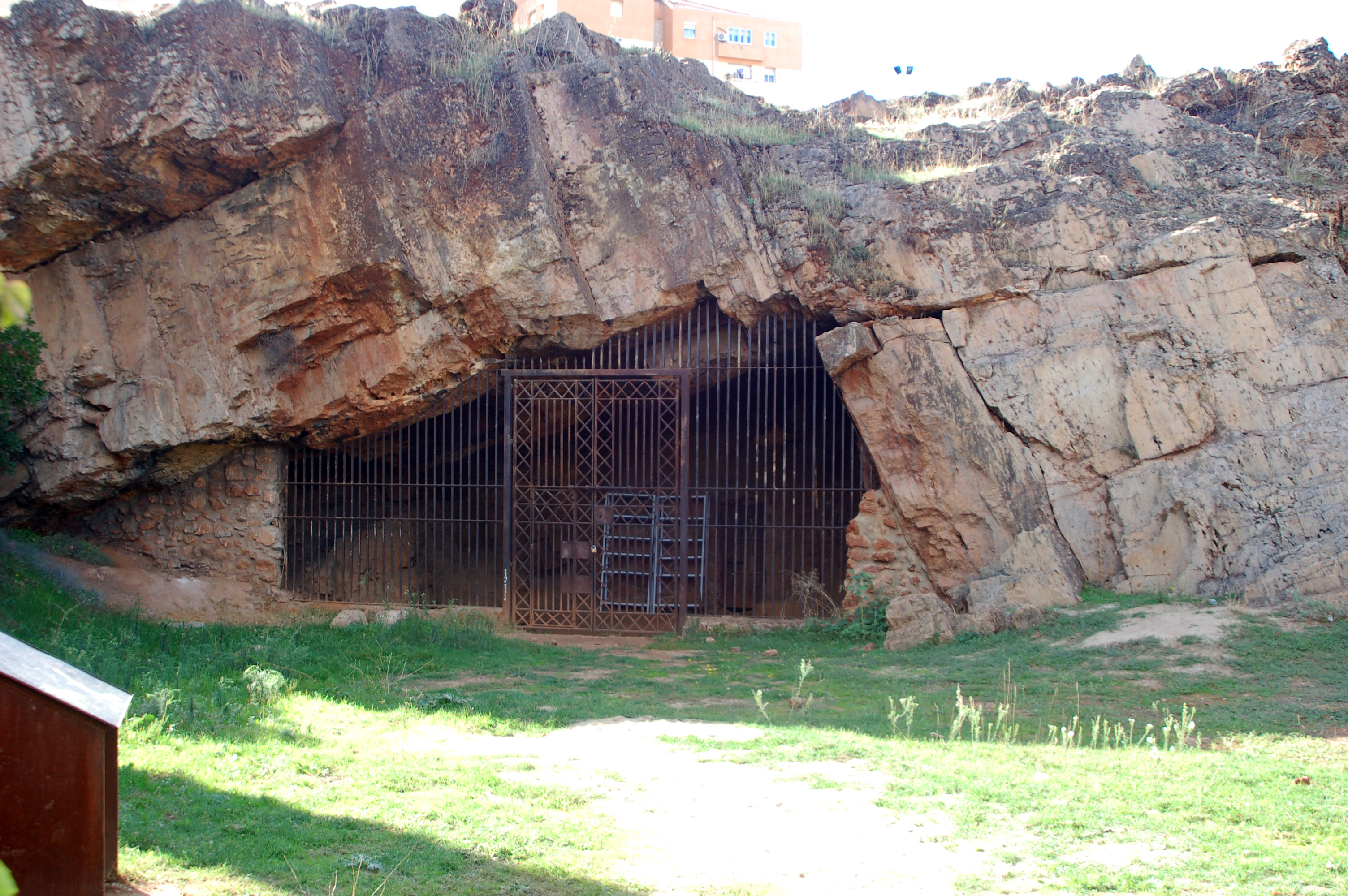 Entrada actual a la cueva de Maltravieso.